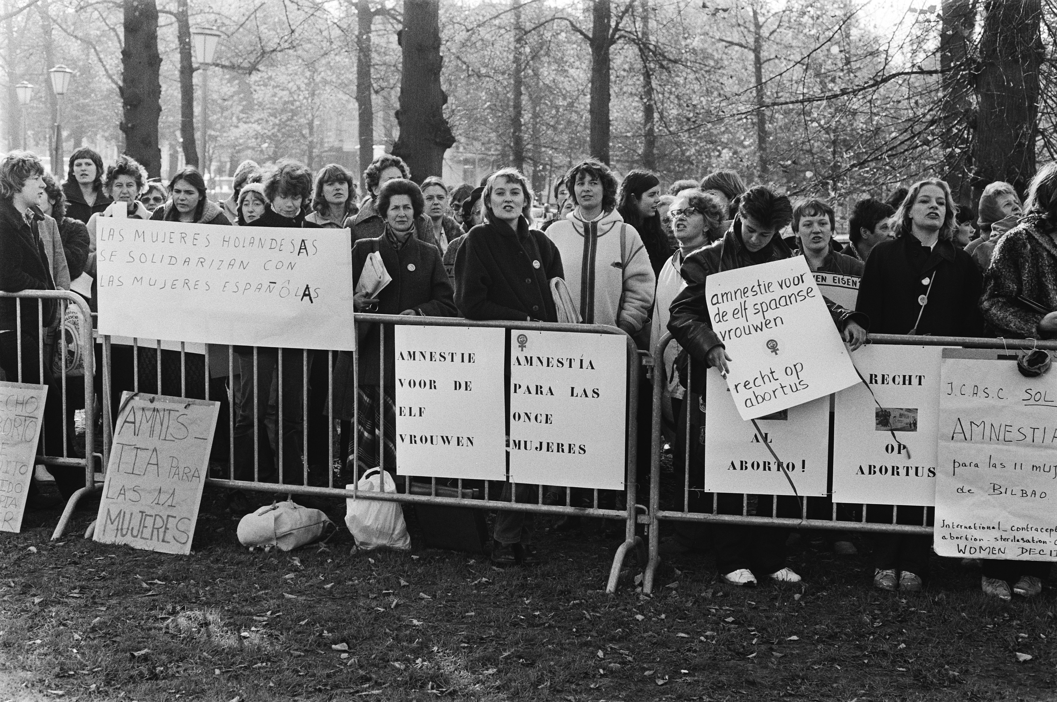 Collectie / Archief : Fotocollectie Anefo Reportage / Serie : Demonstratie van vrouwen voor de Spaanse ambassade in Den Haag tegen abortusprocessen in Spanje Beschrijving : Demonstrerende vrouwen met spandoeken; o.a. "Amnestie voor de elf Spaanse vrouwen", "Amnestia para las once mujeres" en "Recht op abortus" Datum : 26 oktober 1979 Locatie : Den Haag, Zuid-Holland Trefwoorden : abortussen, ambassades, betogingen, spandoeken, vrouwen Fotograaf : Bogaerts, Rob / Anefo Auteursrechthebbende : Nationaal Archief Materiaalsoort : Negatief (zwart/wit) Nummer archiefinventaris : bekijk toegang 2.24.01.05 Bestanddeelnummer : 930-5113